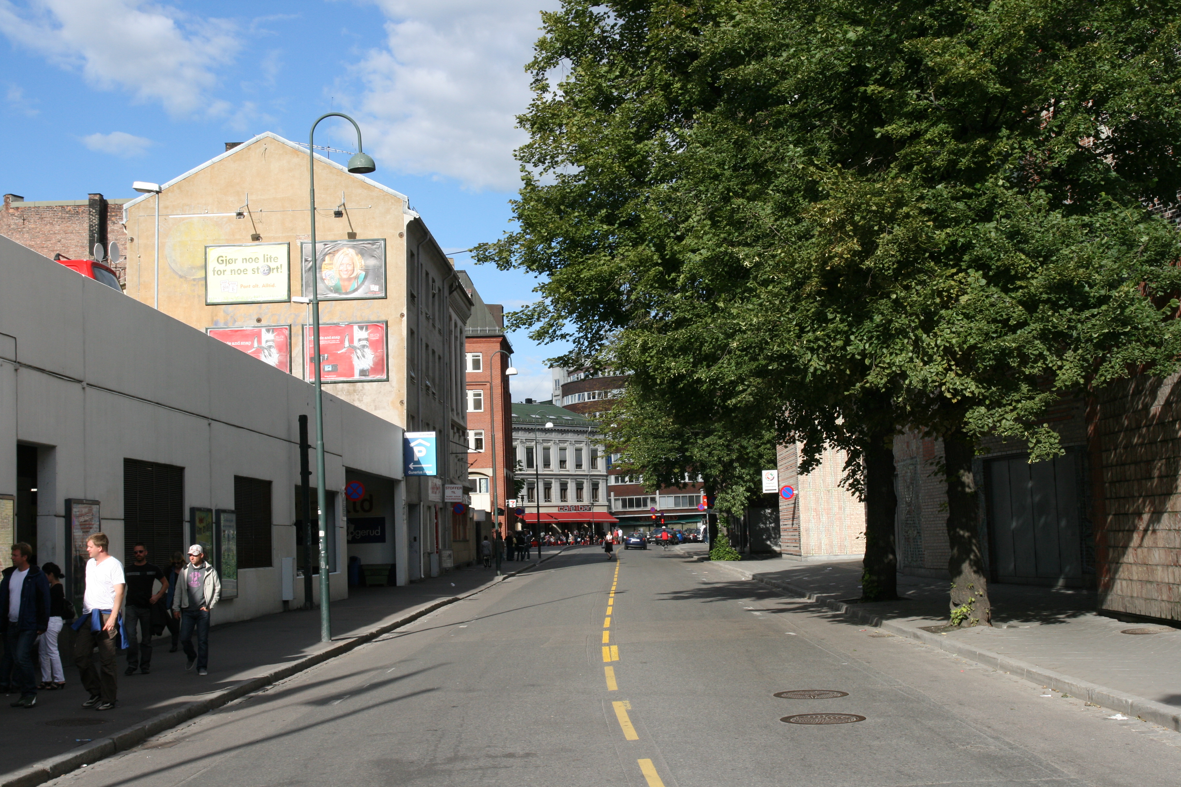 Stenersgata i Oslo